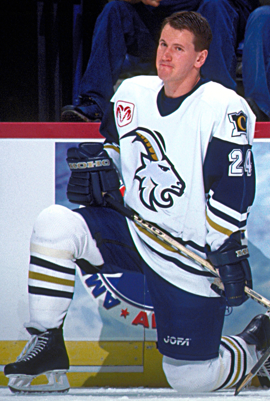 Miloslav Gureň, Québec Citadelles, AHL All-Star Skills Competition 2001